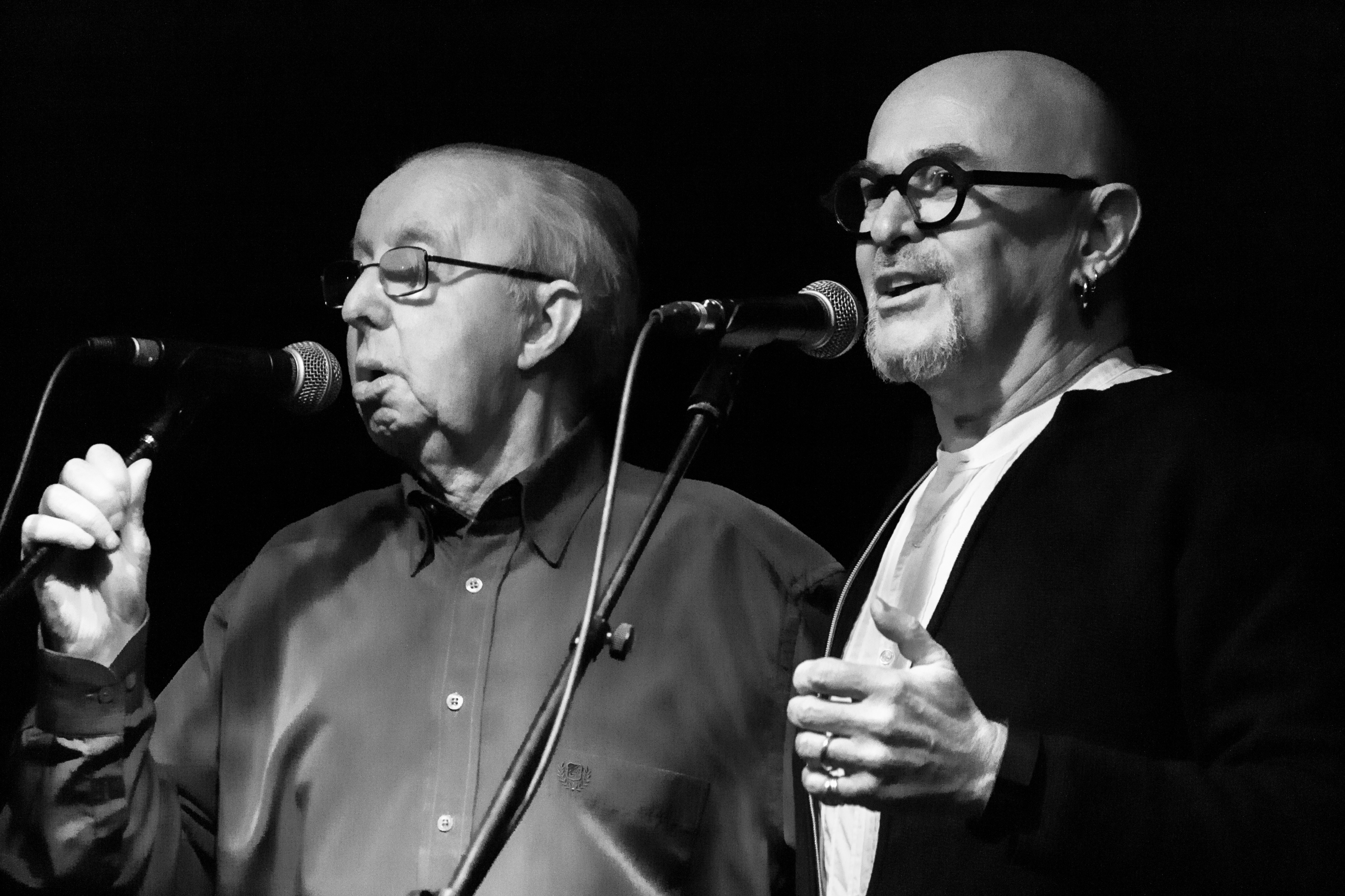 Fest-deiz et fest-noz du 5ème « Entre-deux Fest » organisé le 30 décembre 2016 à Poullaouen par Dañs-tro pour fêter les 26 ans de scène d'Annie Ebrel et Nolùen Le Buhé, célèbre duo de kan ha diskan.